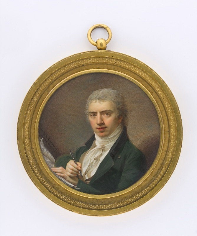 Selbstbildnis Domenico Bossi von 1801, Durchmesser 9,3 cm Aquarell und Gouache auf Elfenbein, authorisiert vom Nationalmuseum Warschau, Inv.Min23